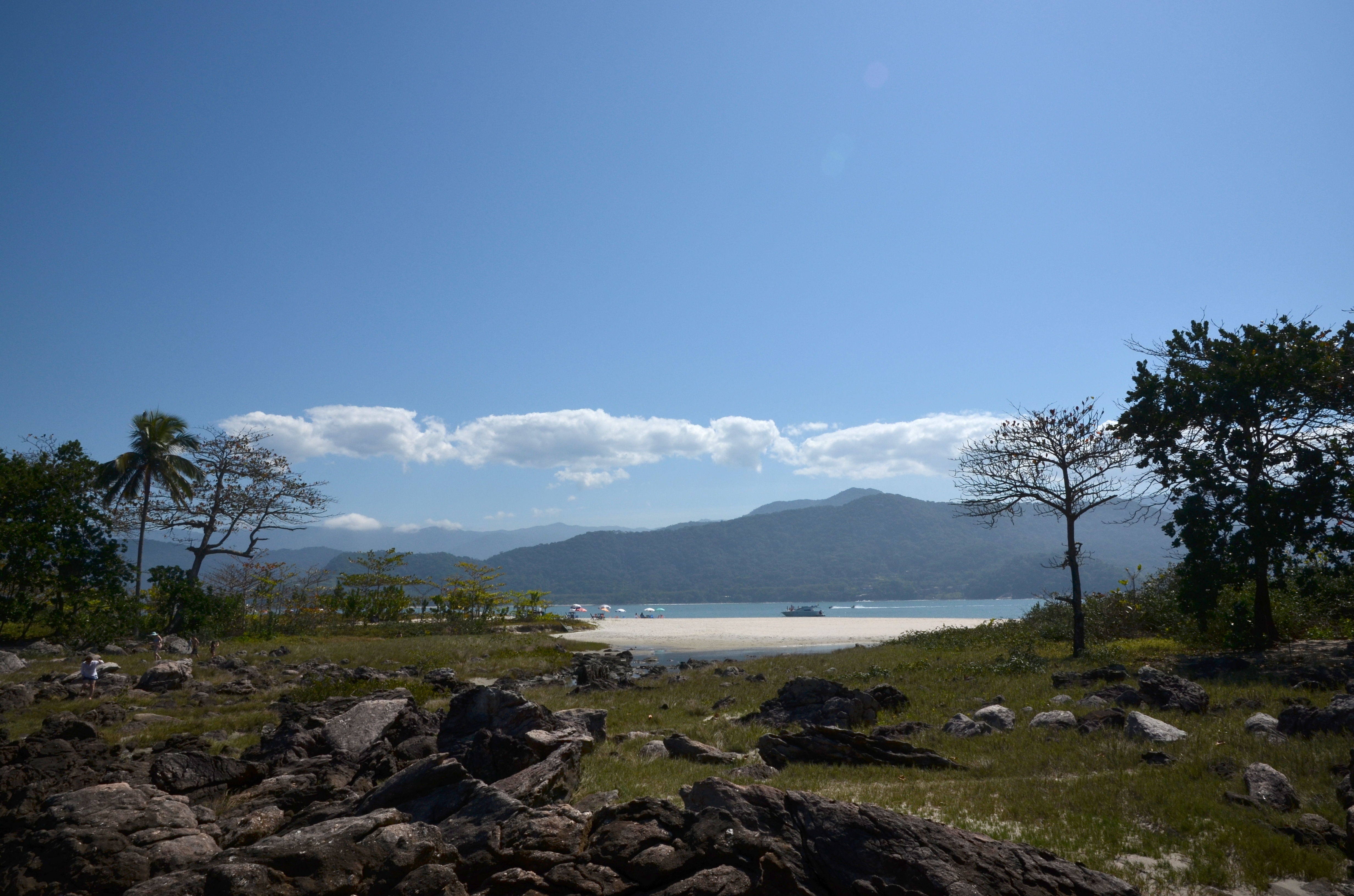 2013-09-06 a 08 Baleia - 111